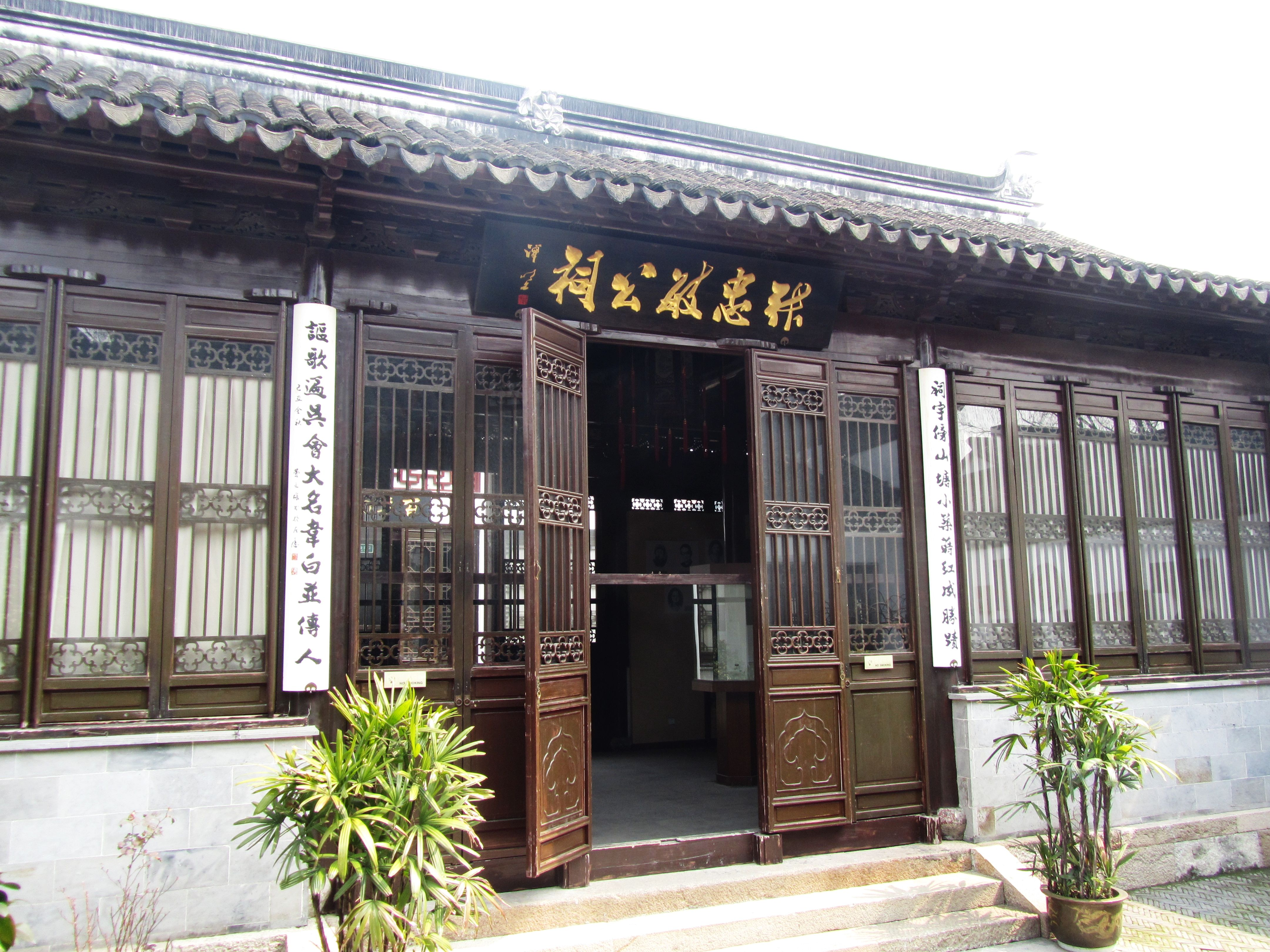 苏州山塘街800号张忠敏公祠，南社成立处。